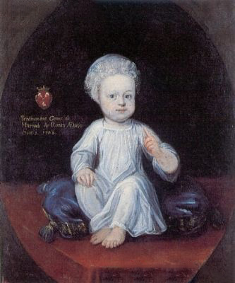 Ferdinand Bonaventura II Anton of Harrach (1708-1788) Lord of Schluckenau, Gross-Priesen und Ober-Markersdorf (in Bohemia) & Janowitz (in Moravia) Lord of Freistadt (in Upper Austria), Namiescht & Luderzow (in Moravia), Harrachstal (in Upper Austria) & Inzersdorf (in Lower Austria). 78 x 95 cm, "Ferdinandus Comes ab Harrach de Rorau Aetatis suae i 1708".